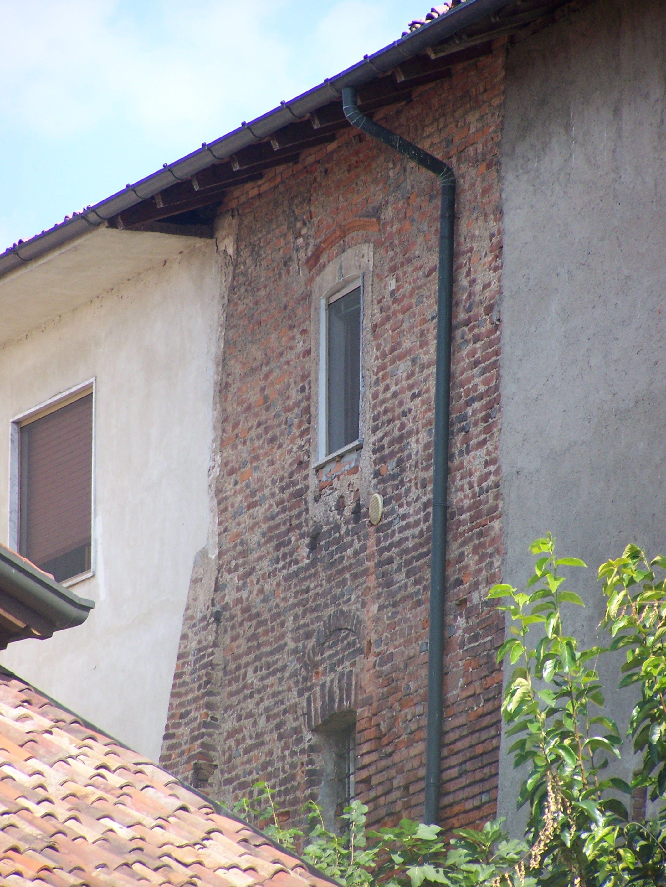 Torrione medievale a Boffalora sopra Ticino (MI) - Italy